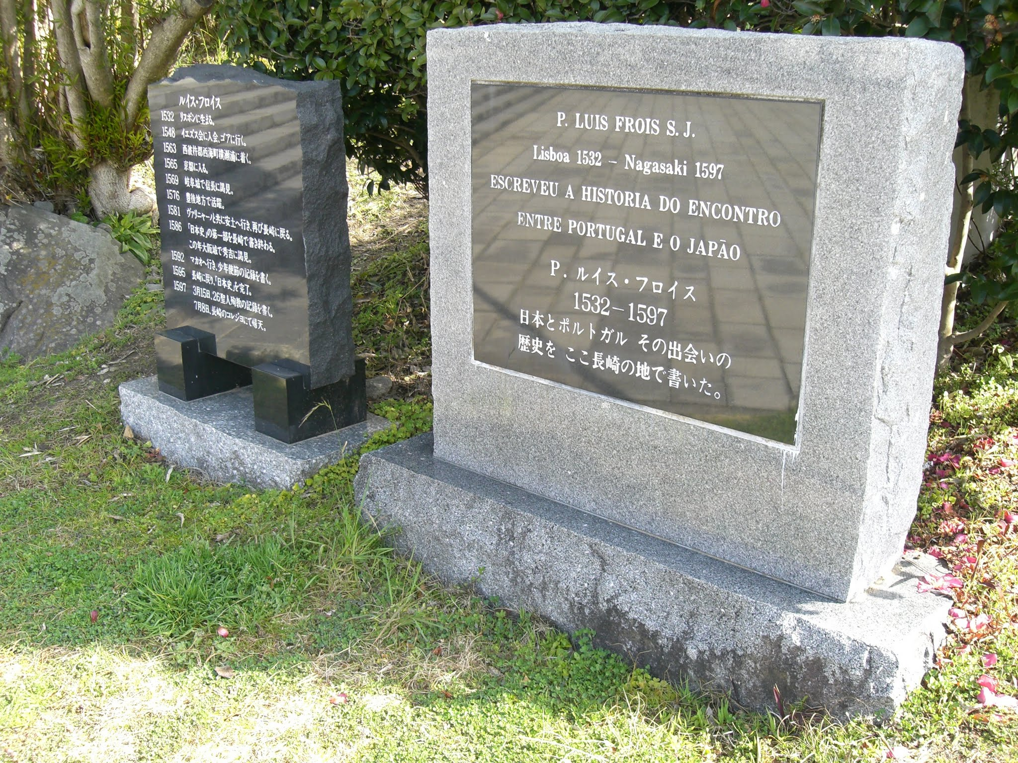 日本二十六聖人殉教地